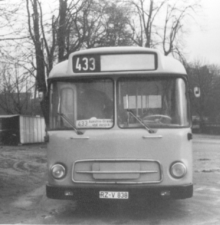 Saturn II, ehemaliger Schnellbus der HHA wurde an einen privaten Busunternehmer verkauft und verkehrte einige Jahre im Auftrag der Kraftpost auf der Linie Aumühle-Grande. Aufnahme: Februar 1975.